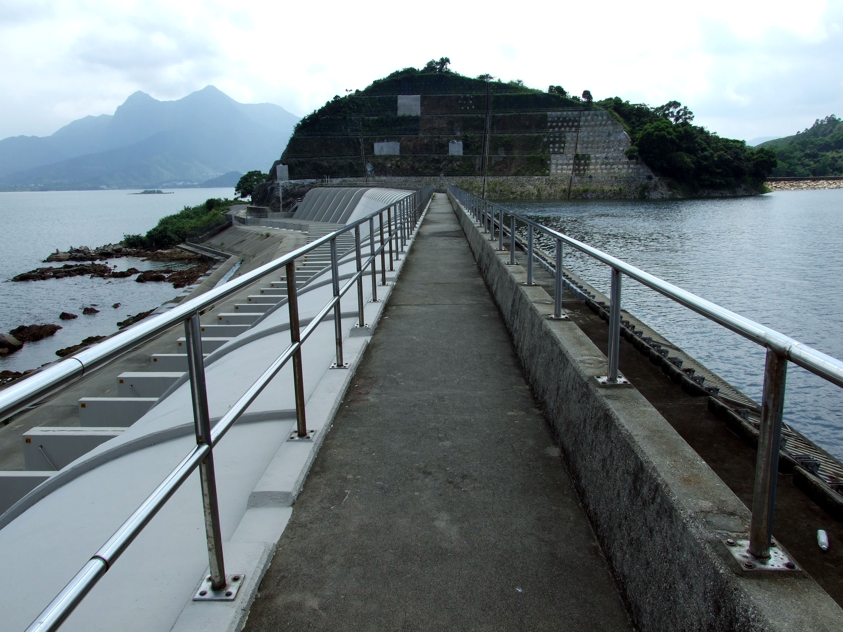 中文（香港）: 東頭洲